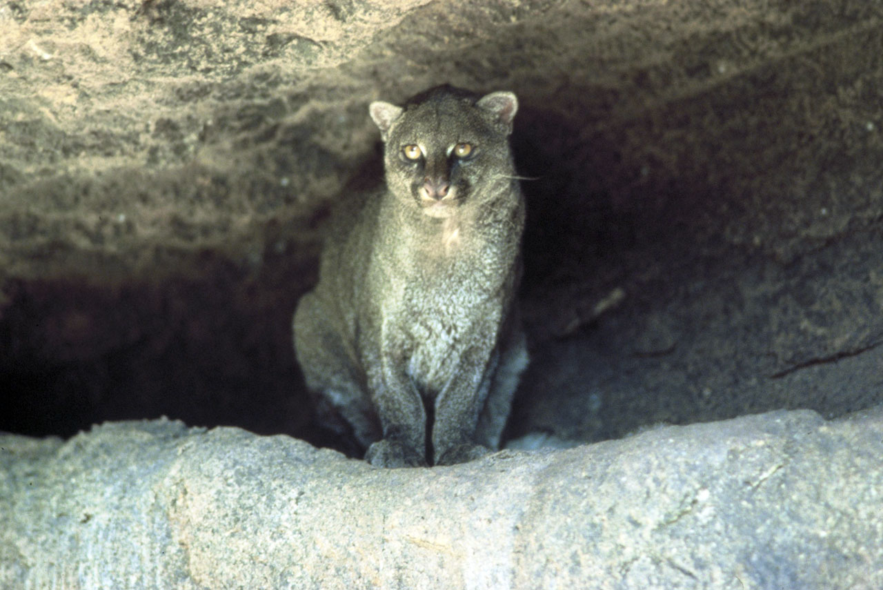 Jaguarundi.